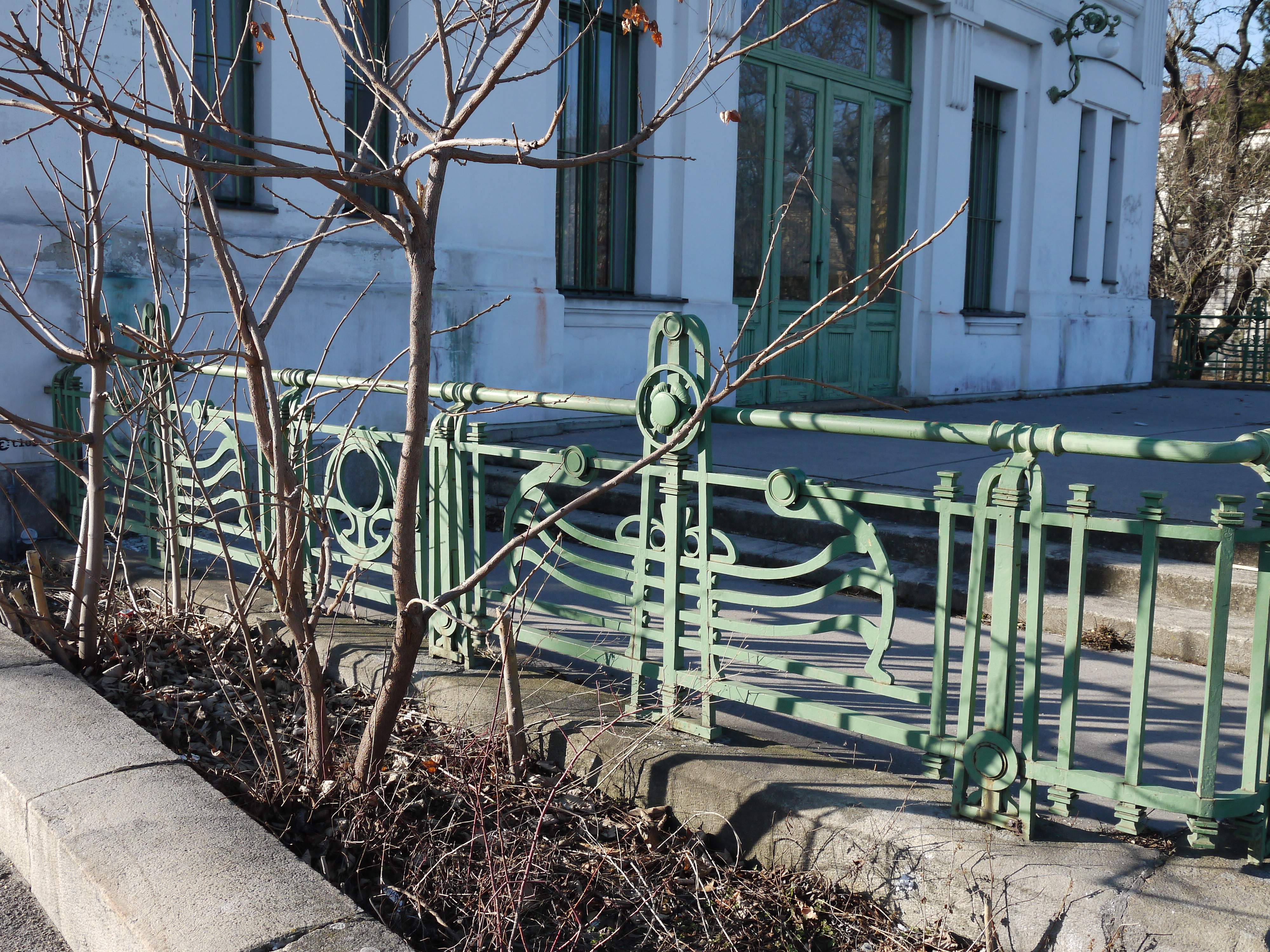 Hofpavillon Hietzing